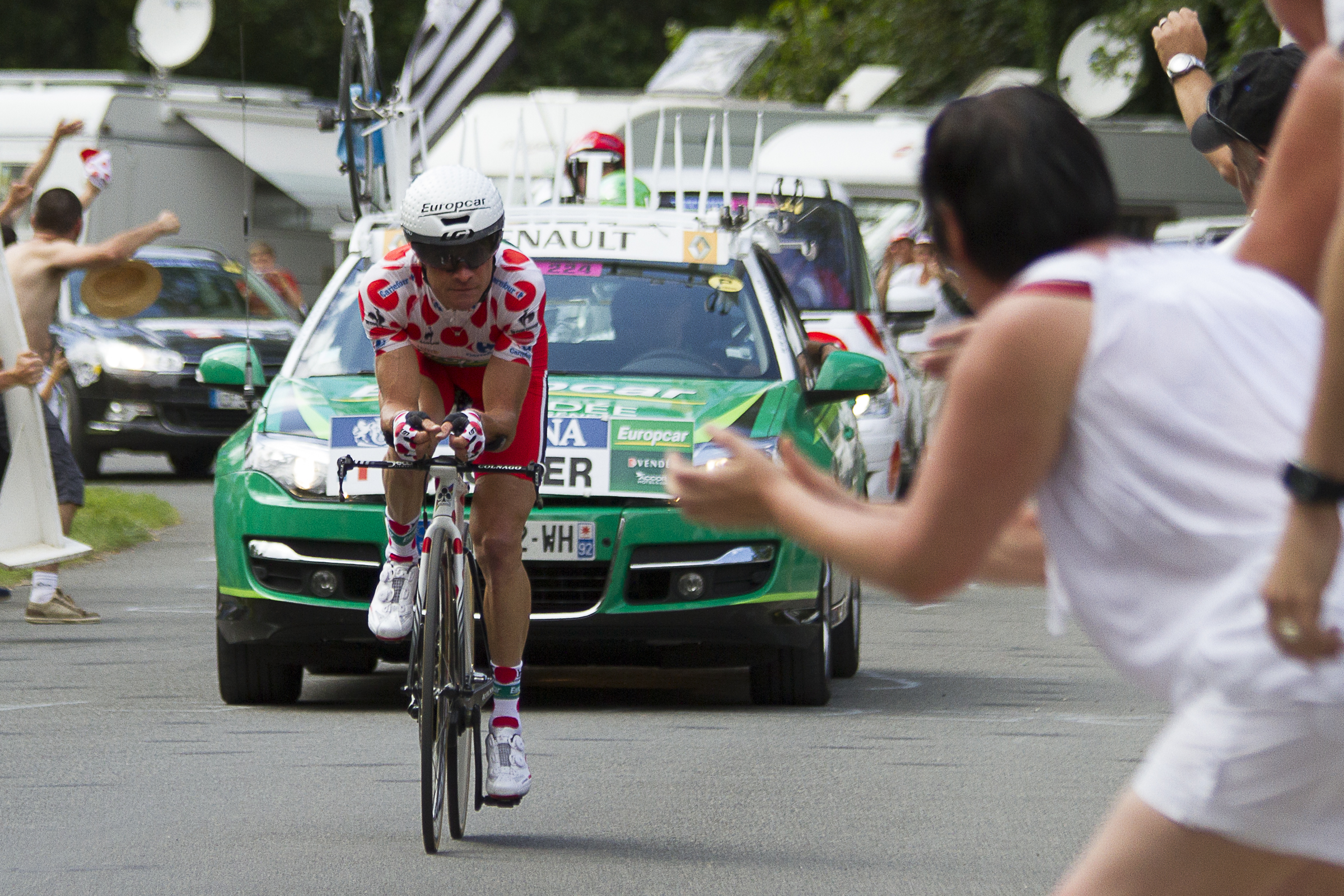 étape 19 du Tour de France 2012.